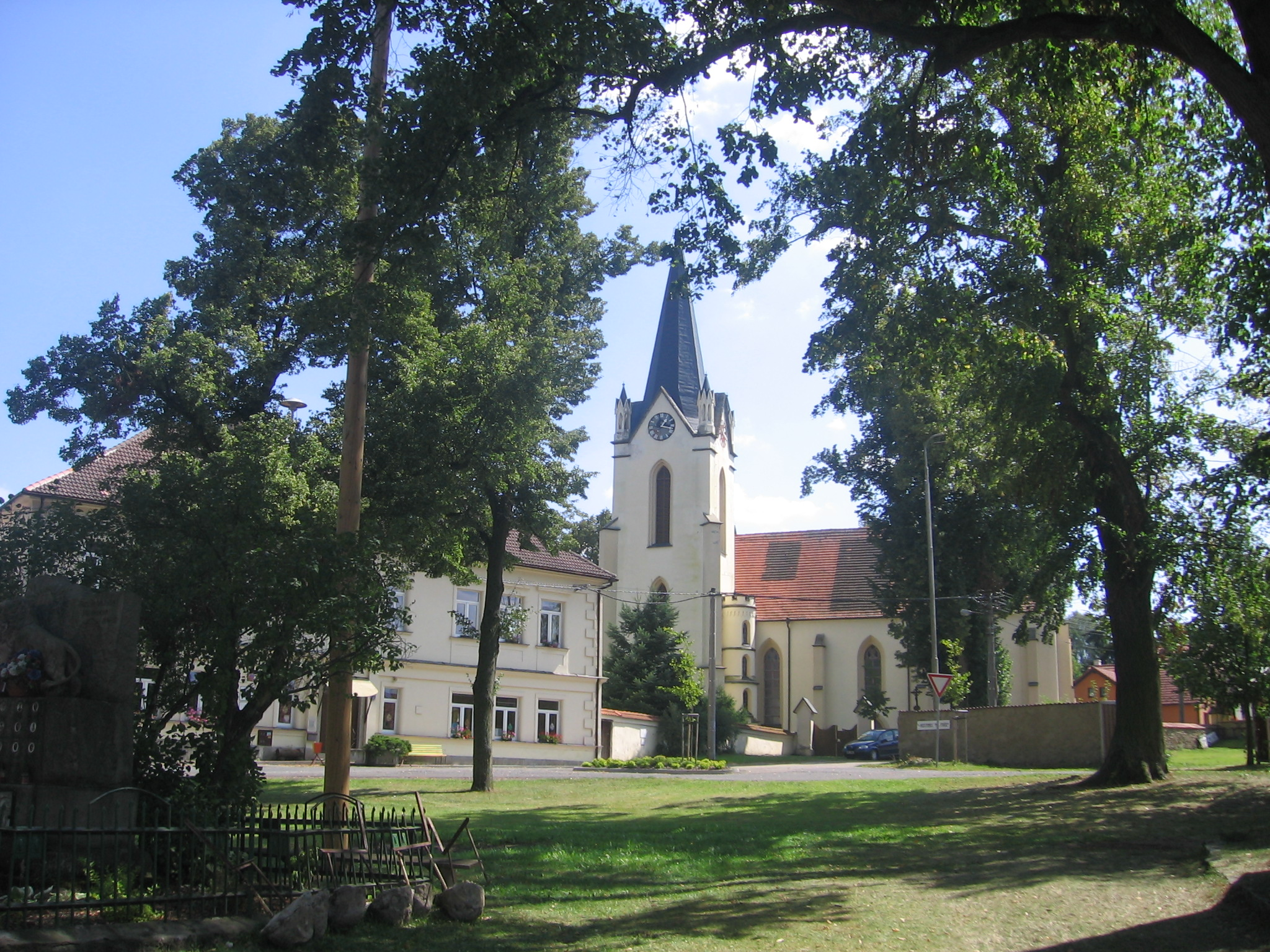 Kostel sv. Vavřince, Vrčeň, okr.Plzeň-jih